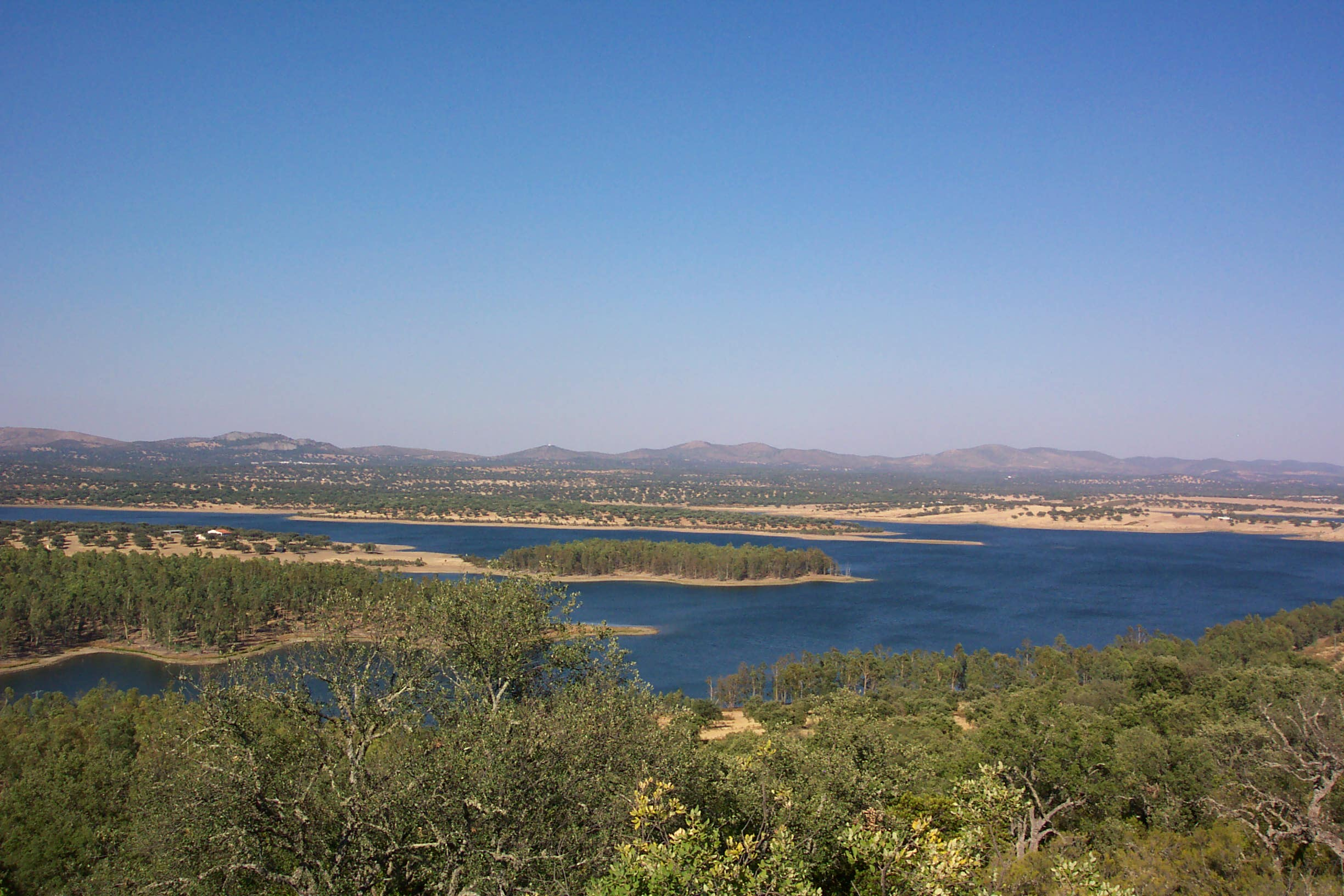 Presa Horno Tejero. Entorno de dehhesas junto a Cordobilla de Lácara